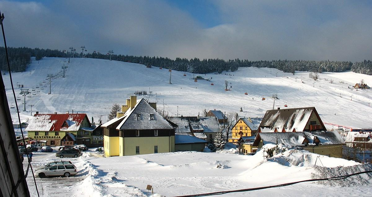 Wyciągi narciarskie w Zieleńcu